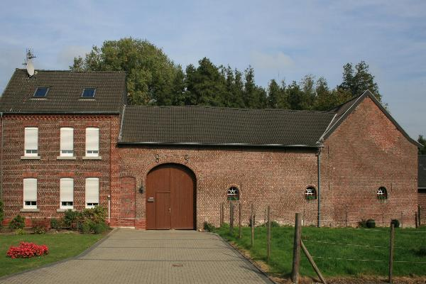 Backsteinhofanlage in Wegberg-Bissen